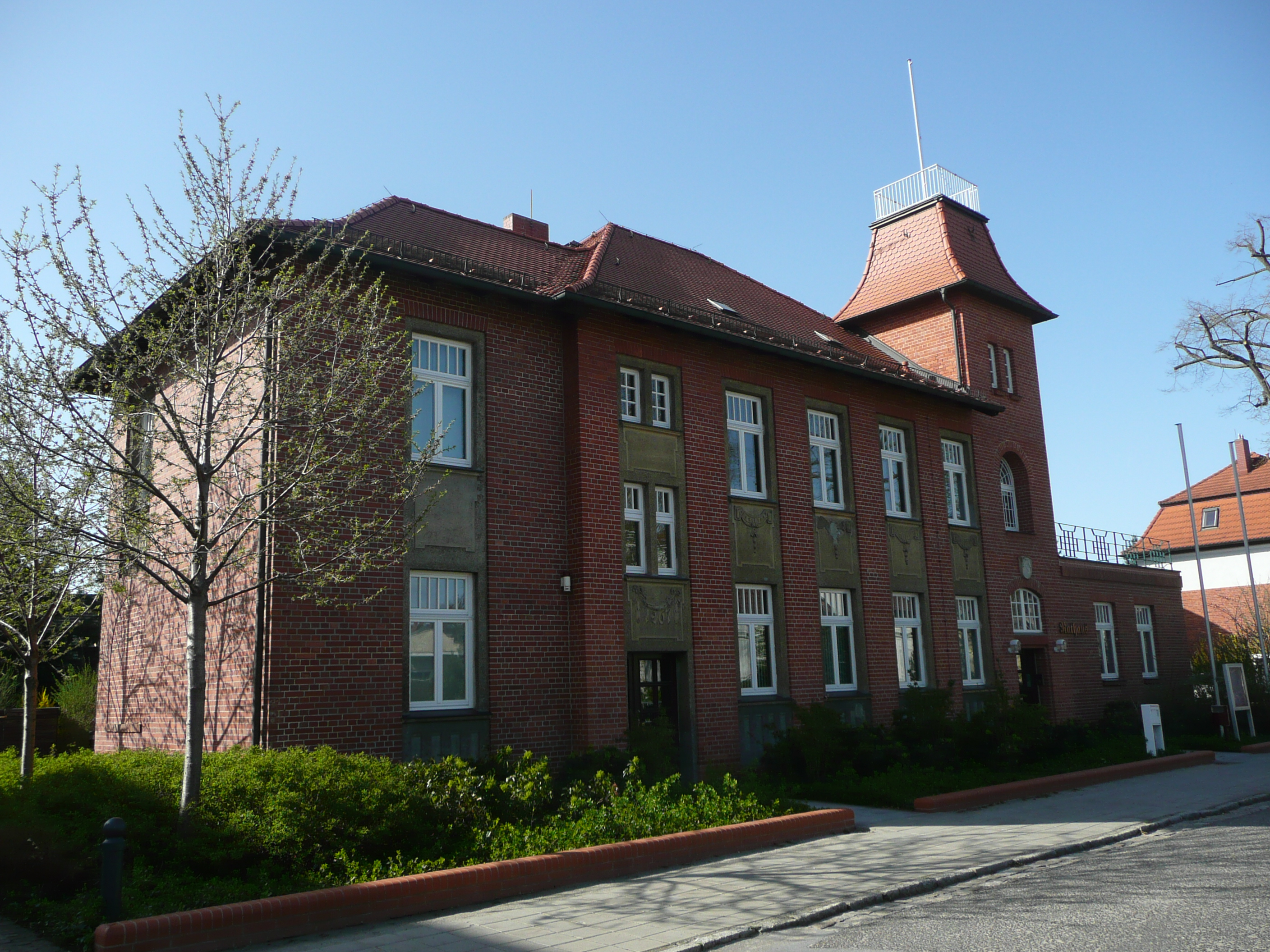 Das Rathaus von Welzow (Poststraße 8)